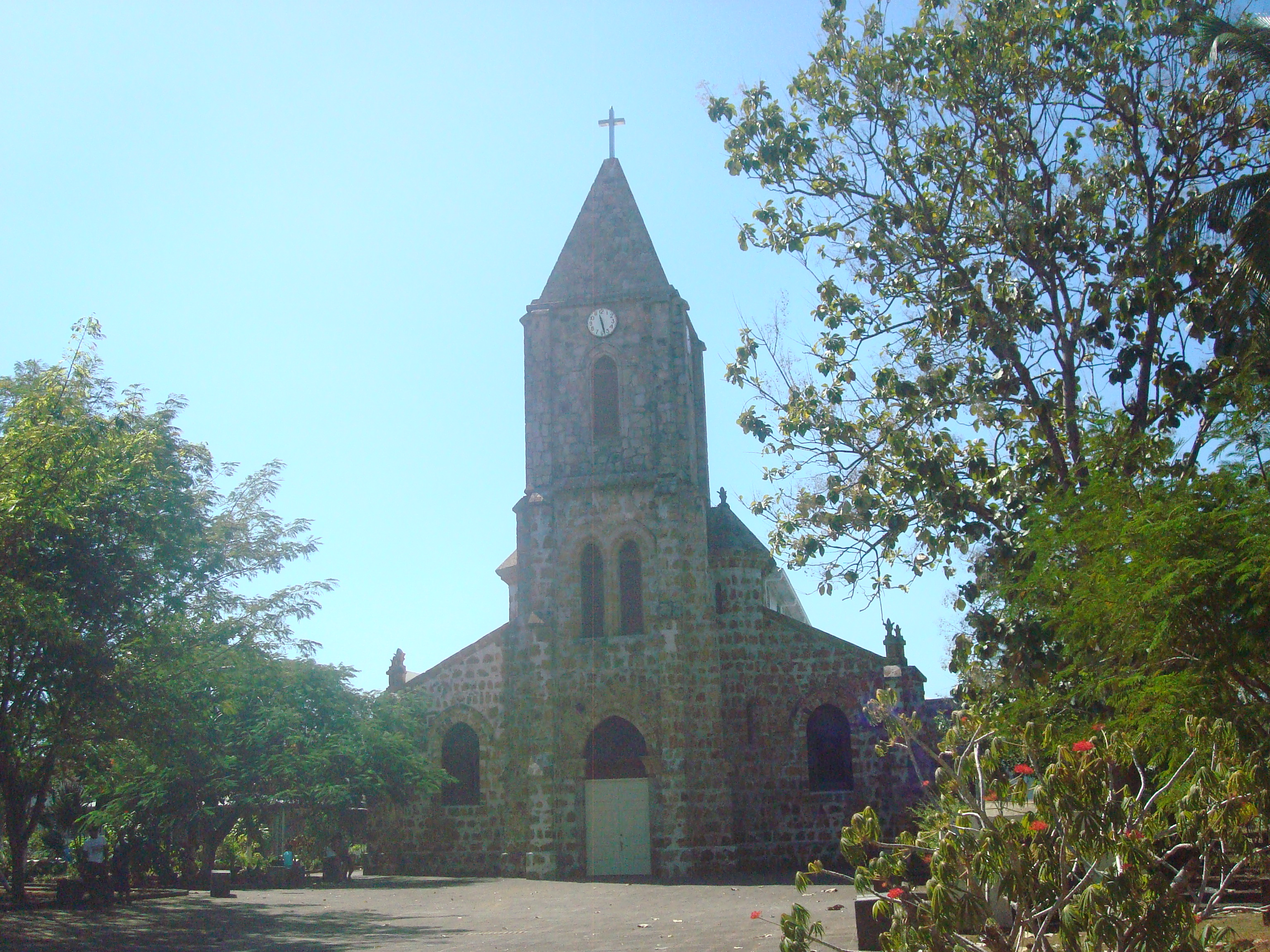 Catedral de la ciudad de Puntarenas, Costa Rica, construida en 1845.